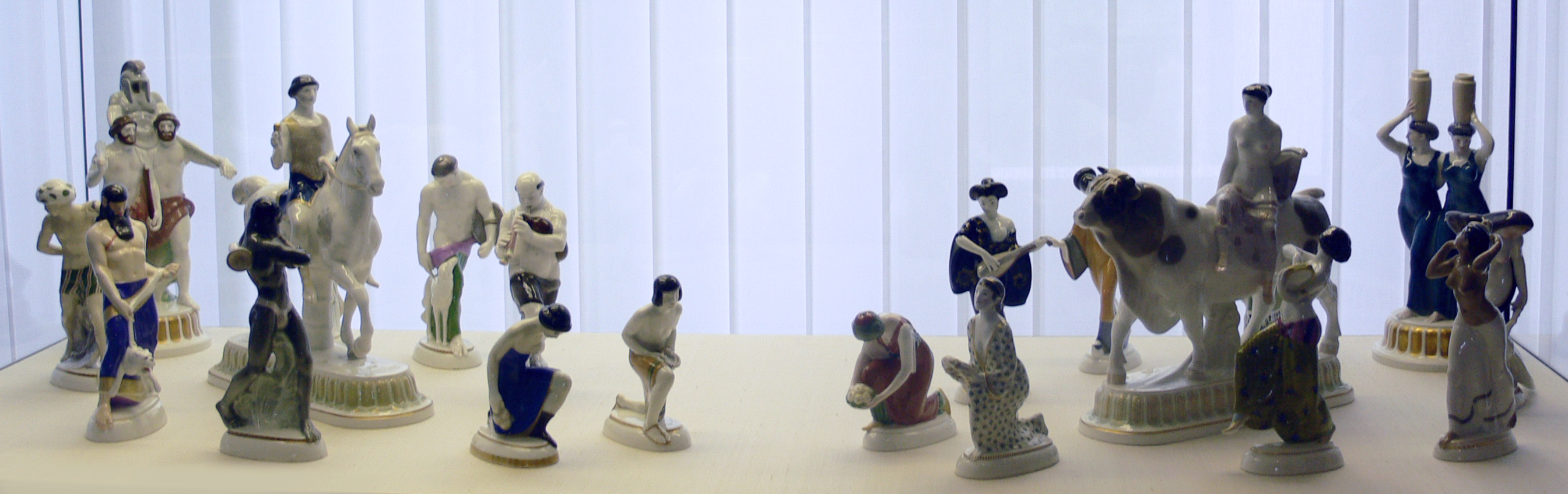 „Hochzeitszug“ von Adolph Amberg, Königliche Porzellan-Manufaktur, Berlin nach 1911 Kunstgewerbemuseum Berlin